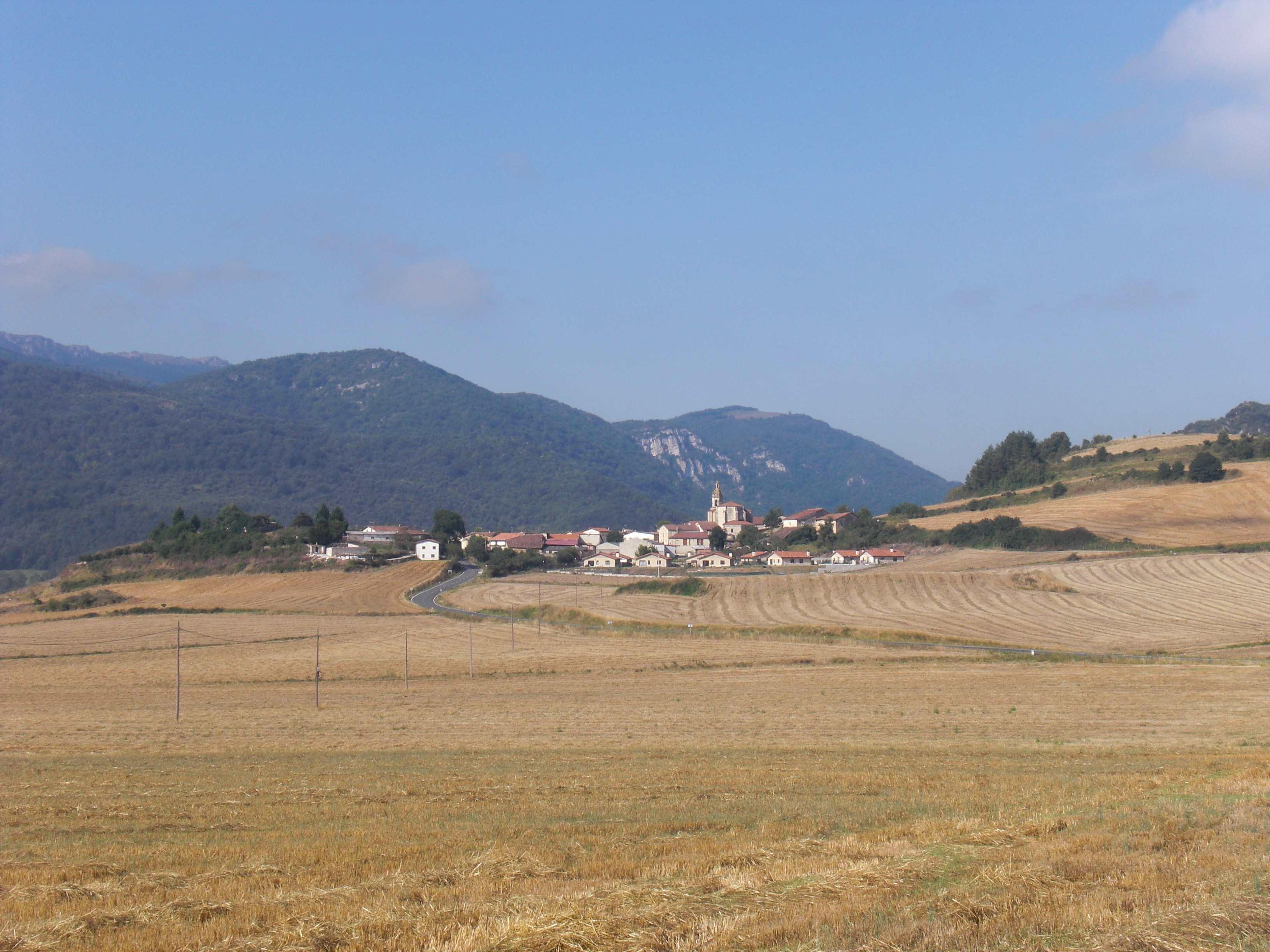 Pagoetako ikuspegia